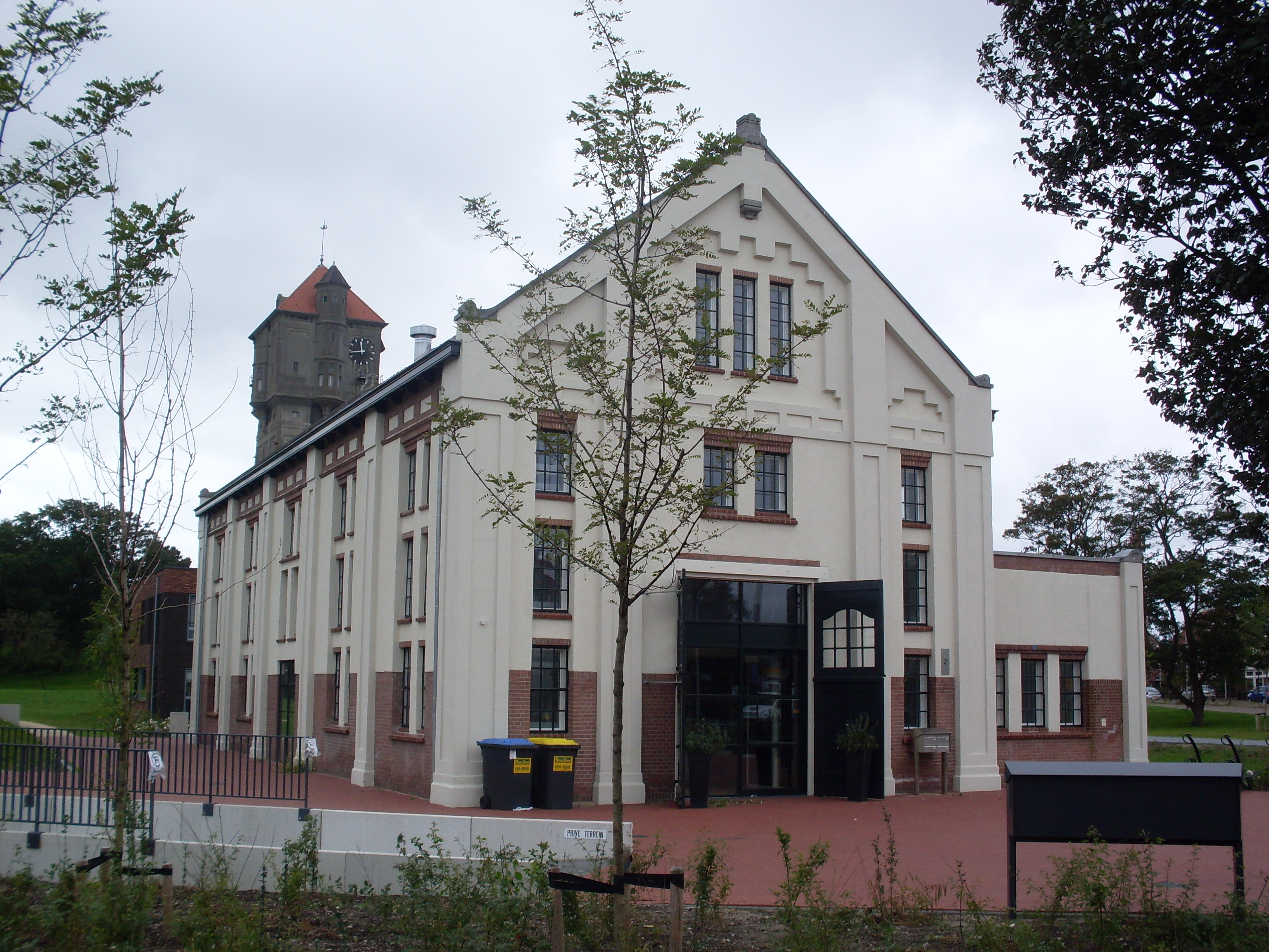 Filtergebouw bij de watertoren te Ijmuiden. Evertsenstraat 2.